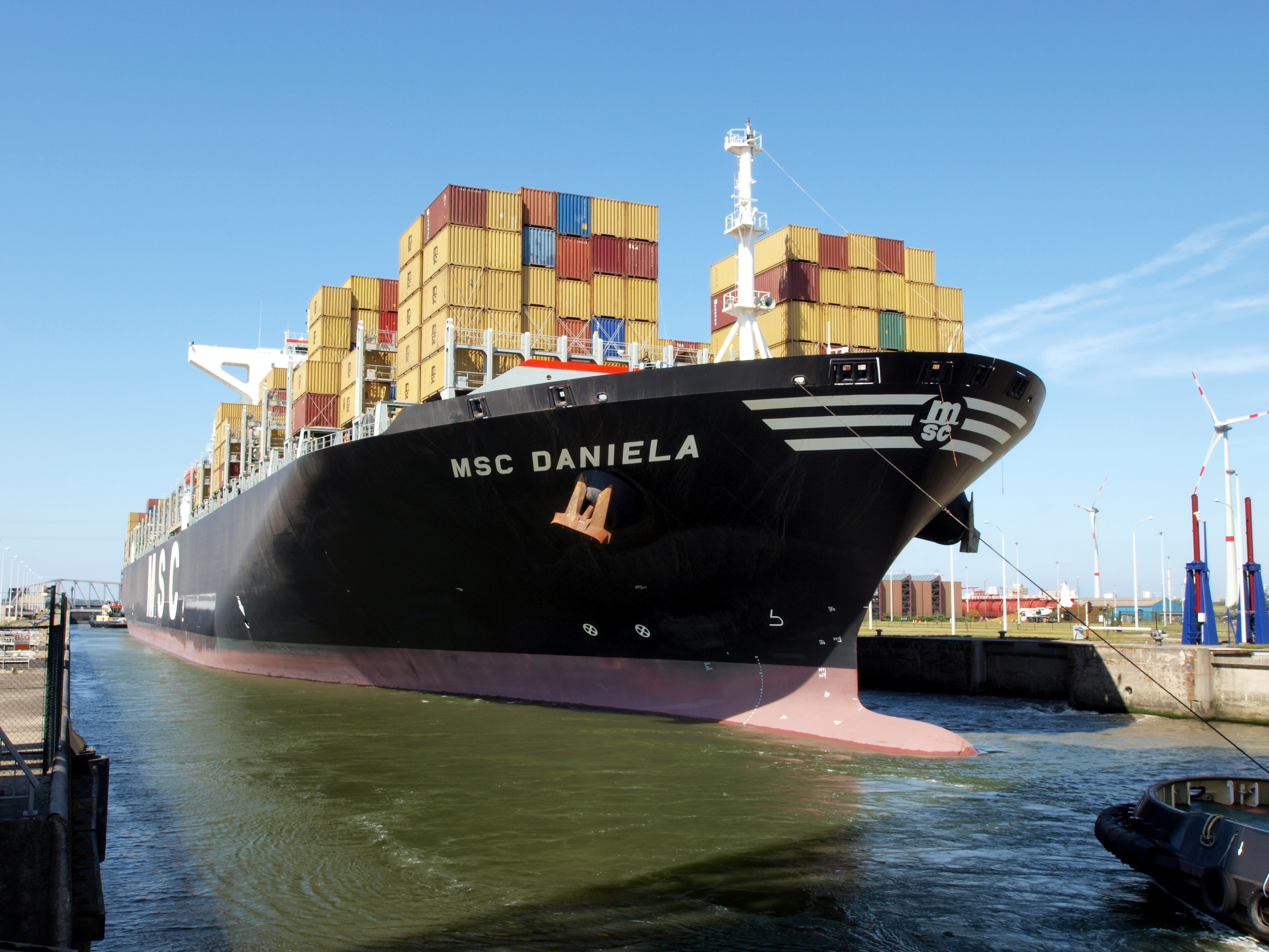 MSC Daniela - IMO 9399002 - Callsign 3FIA2